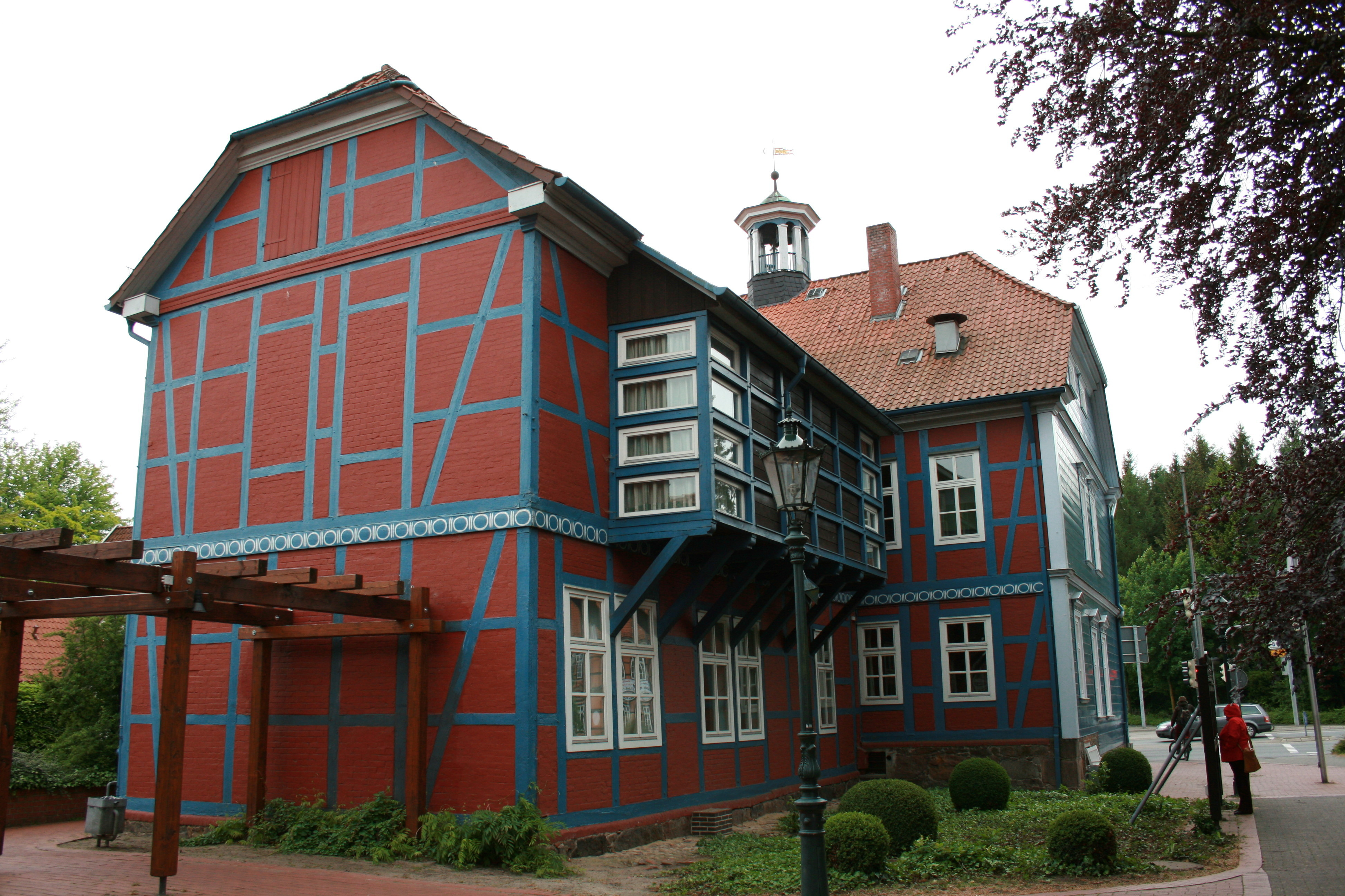 Altes Rathaus an der Poststraße in Soltau